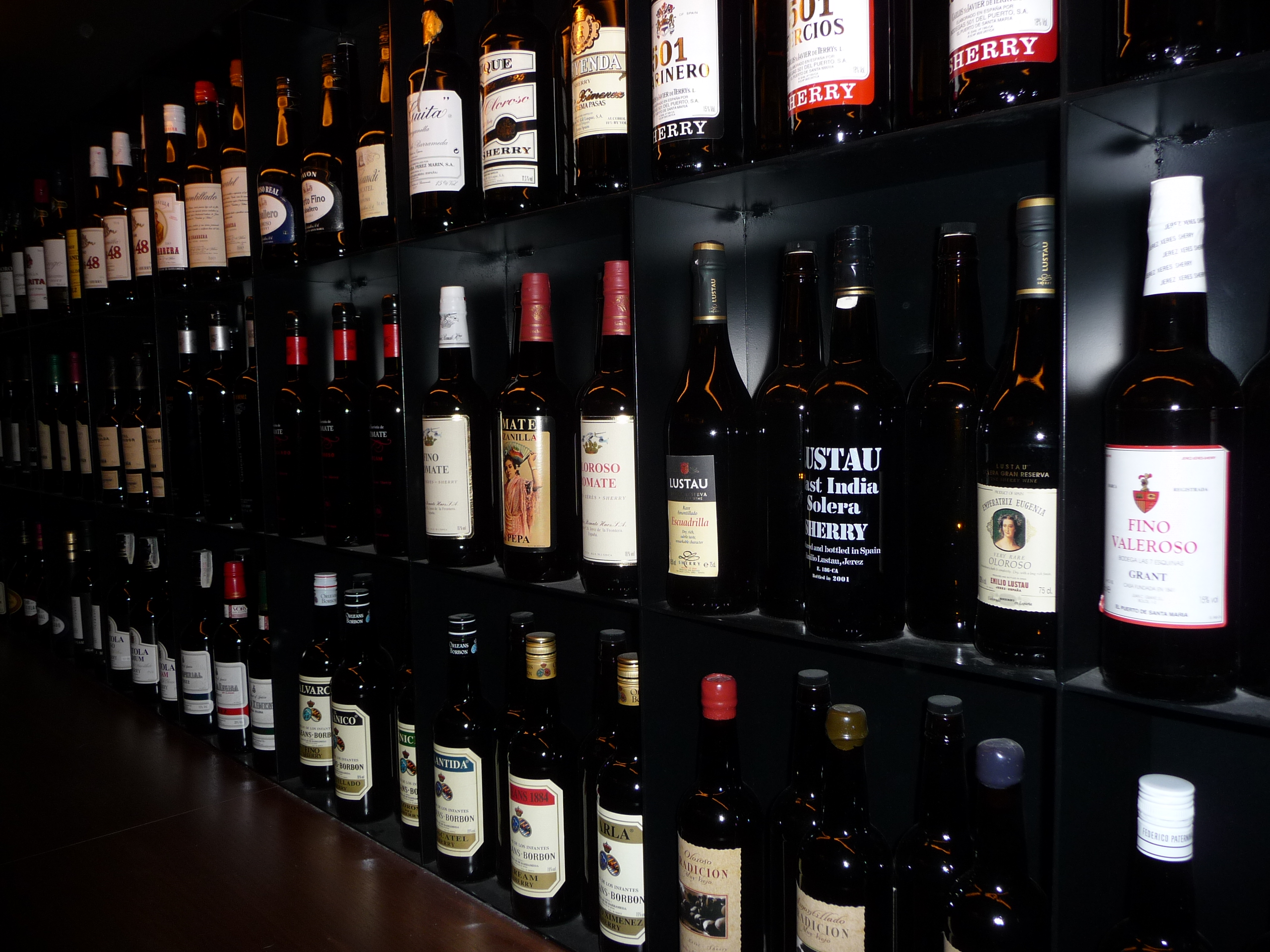 LaAtalaya-Jerez-Sherry-p1020342.jpg